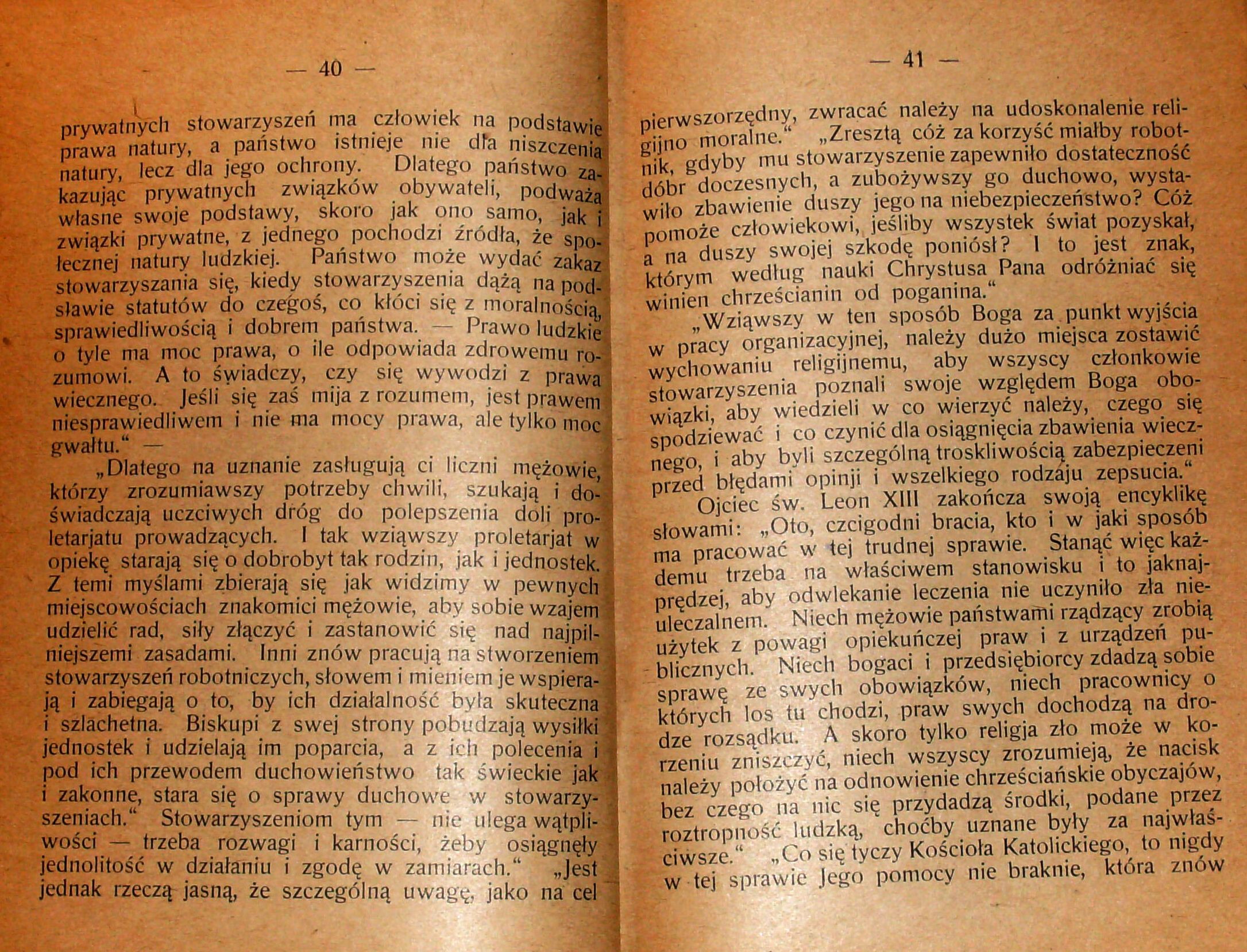 Stanisław Krzyżowski, Rozmyślania w czterdziestą rocznicę encykliki „Rerum novarum”, wydanej 15 maja 1891 r. przez papieża Leona XIII, Pszczyna 1931